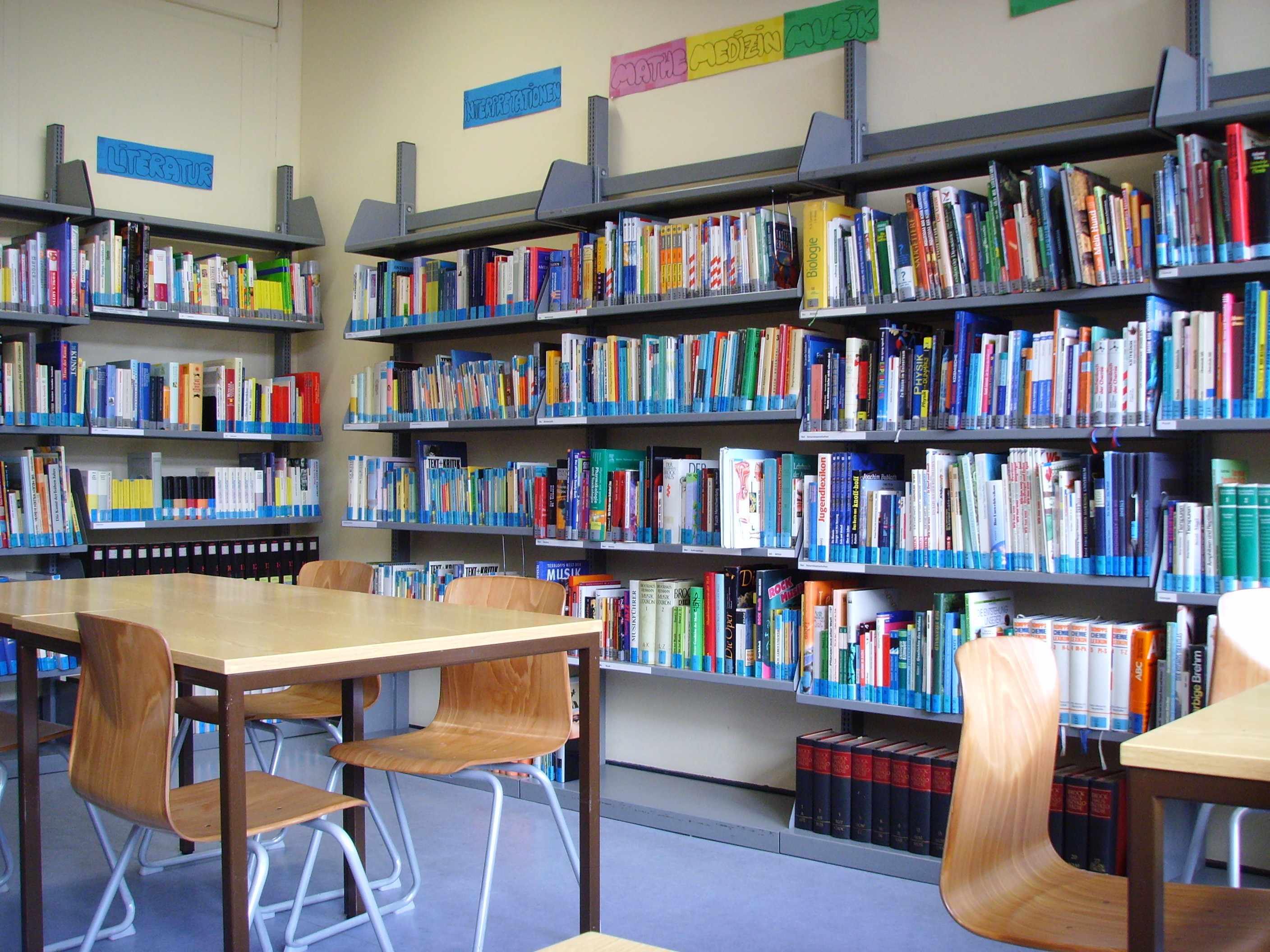 Ziehenschule, Frankfurt am Main-Eschersheim, Schulbibliothek